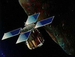 Grafik der NASA-Raumsonde NEAR, die den Asteroiden Eros besuchte und am Ende ihrer Mission auf ihm landete.